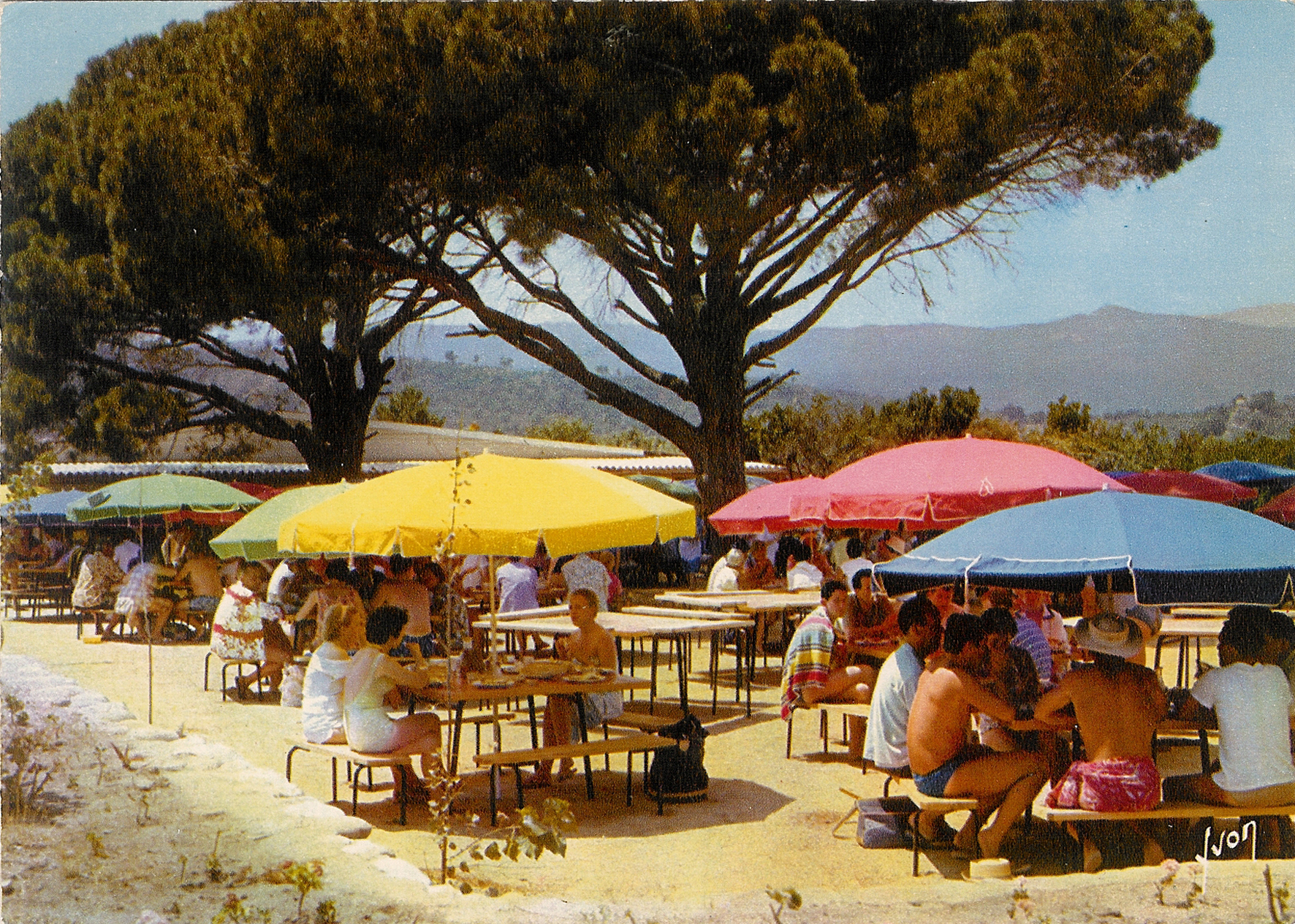 Village du Club Med de Santa Giulia, Corse, France ; Carte postale Yvon